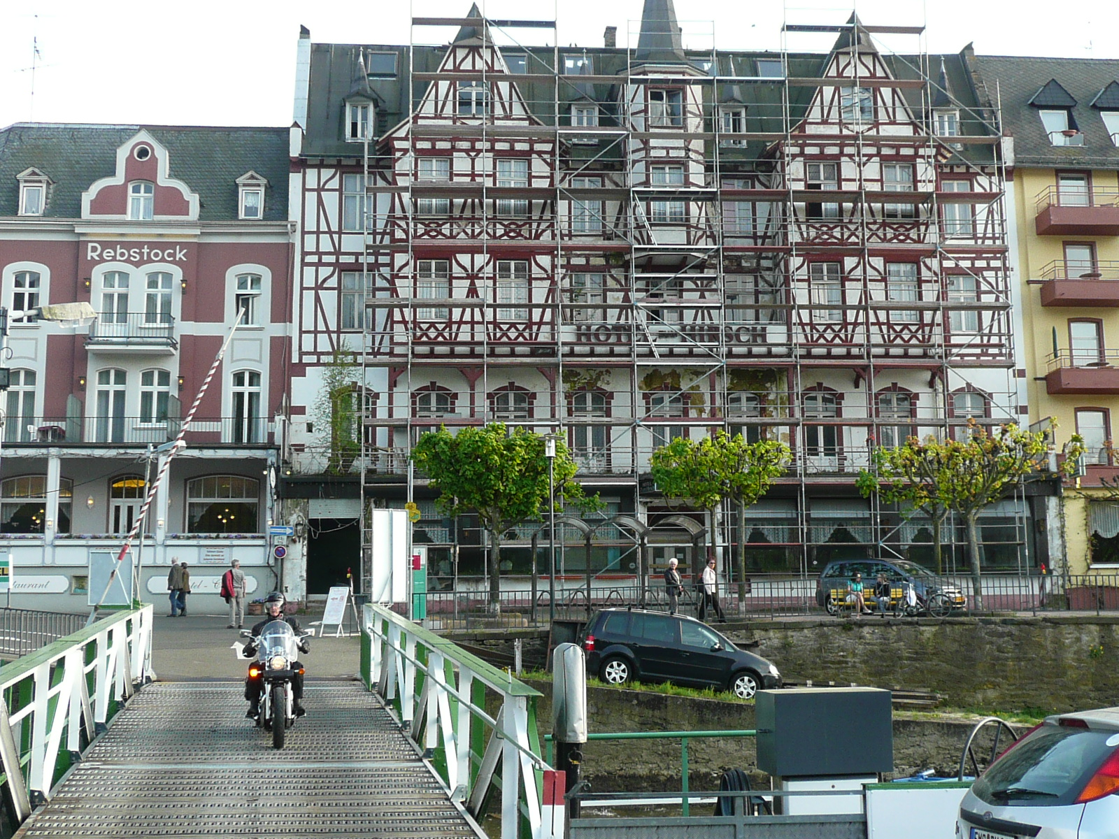 Viergeschossiges Fachwerkhaus, teilweise verputzt, Holzloggia, um 1900 (2009 teilweise, 2011 vollständig abgebrochen)